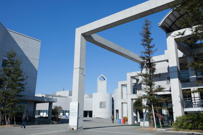 流通科学大学 キャンパス風景